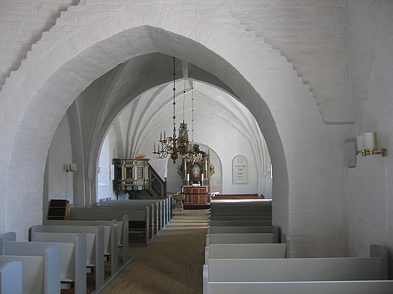 Elling kirkes inventar